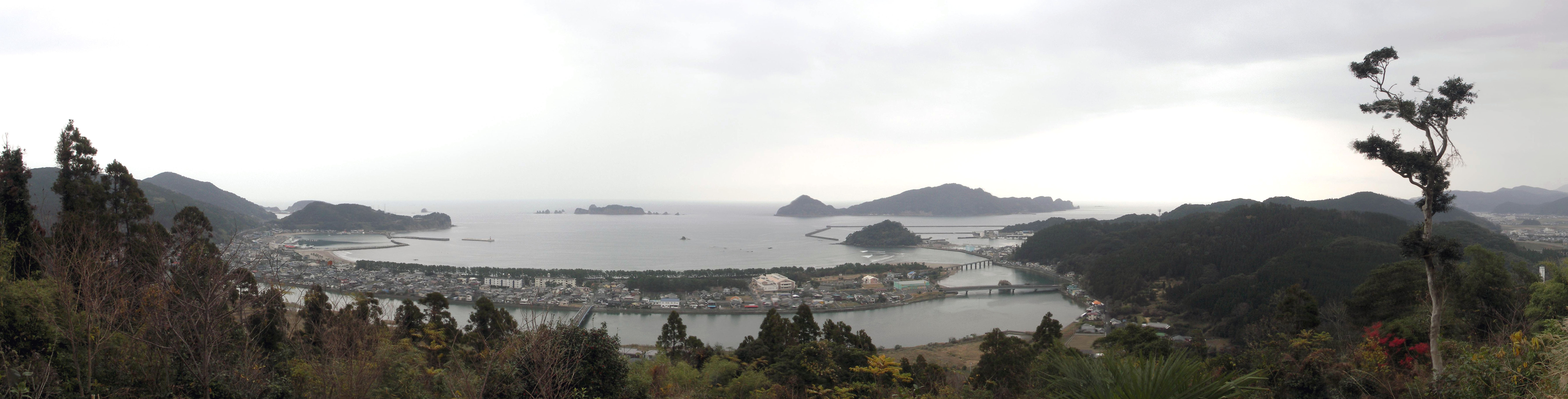 Odotsu,大堂津 遠景